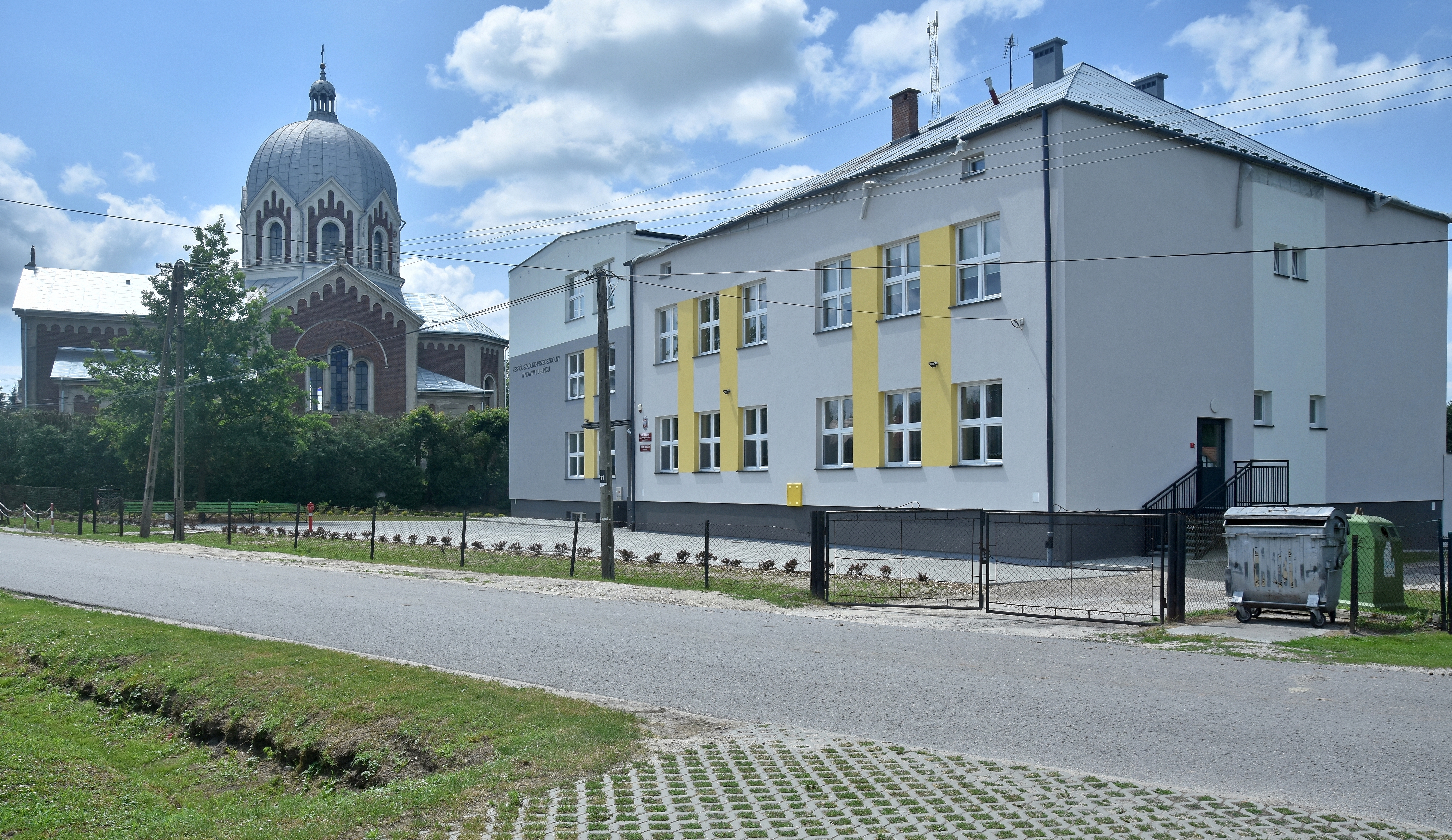 Nowy Lubliniec, Cerkiew Przemienienia Pańskiego w Nowym Lublińcu